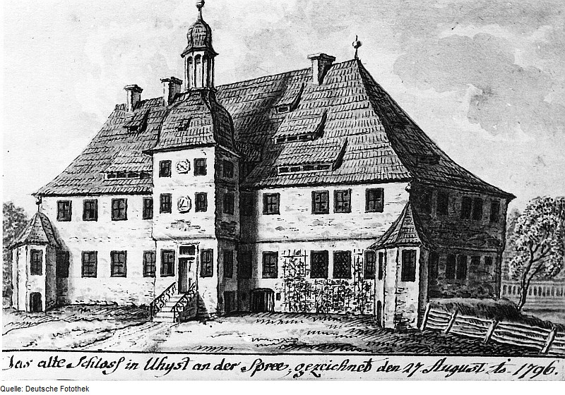 Original image description from the Deutsche Fotothek Uhyst. Schloß, Zeichnung vom 27.8.1796